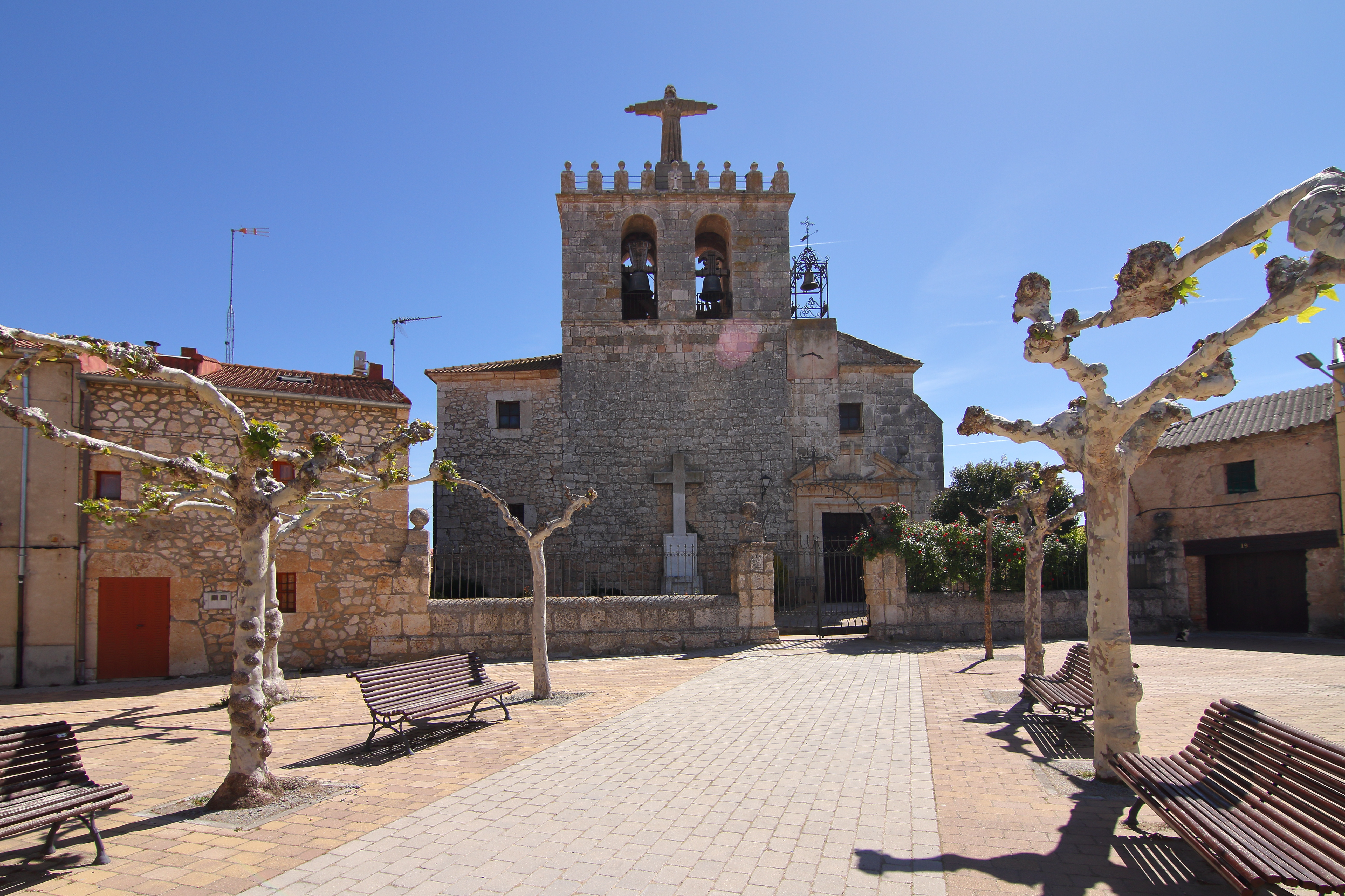 Fuentecén, Iglesia de San Mamés Martir, 01